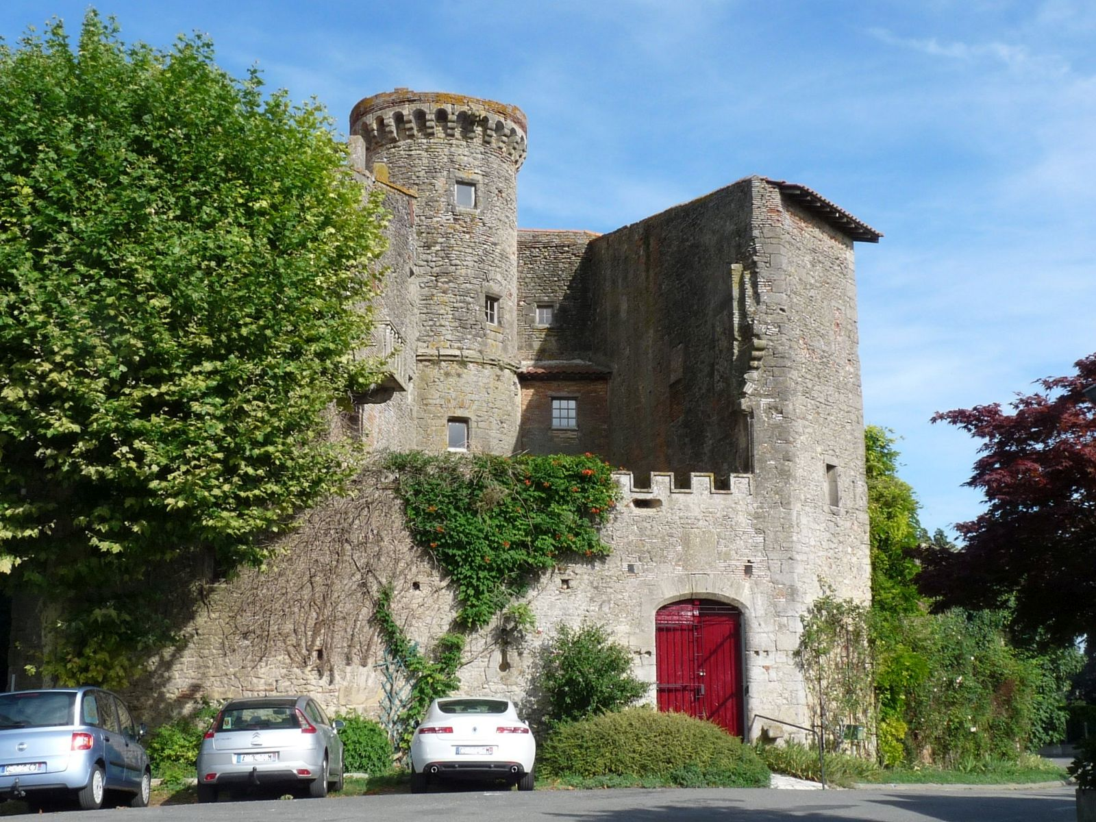 Château de Beauteville, Haute-Garonne, France